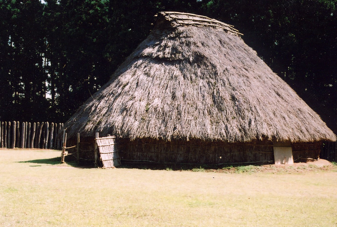 復元された地蔵田遺跡（竪穴住居）